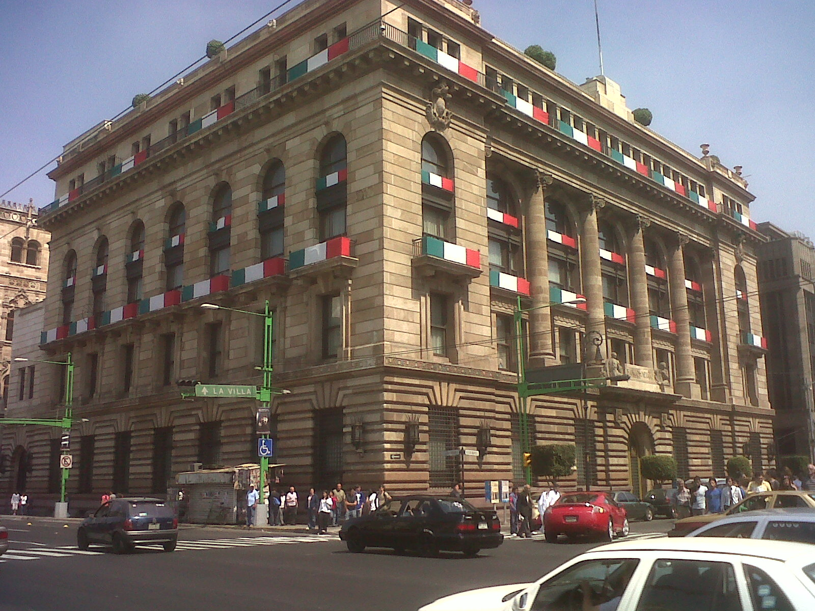 Edificio del Banco de México — en Avenida 5 de Mayo, Centro Histórico del México, D. F.